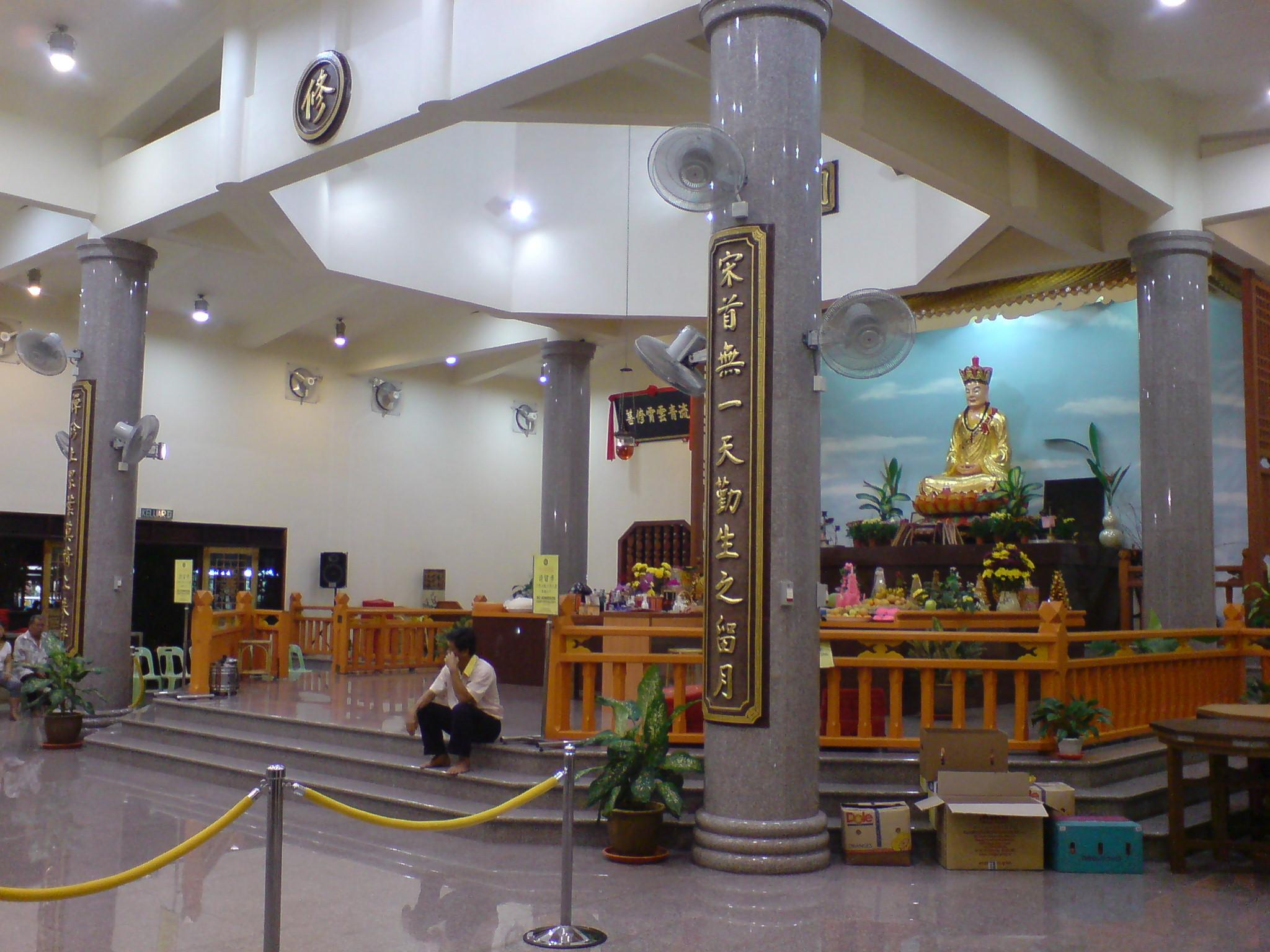 Inside Temple 001